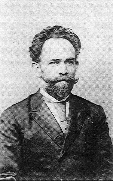 Conrad Weidmann - Kriegsreporter beim Araberaufstand